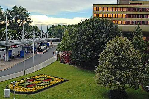 Germany Bergkamen Busbahnhof und Rathaus